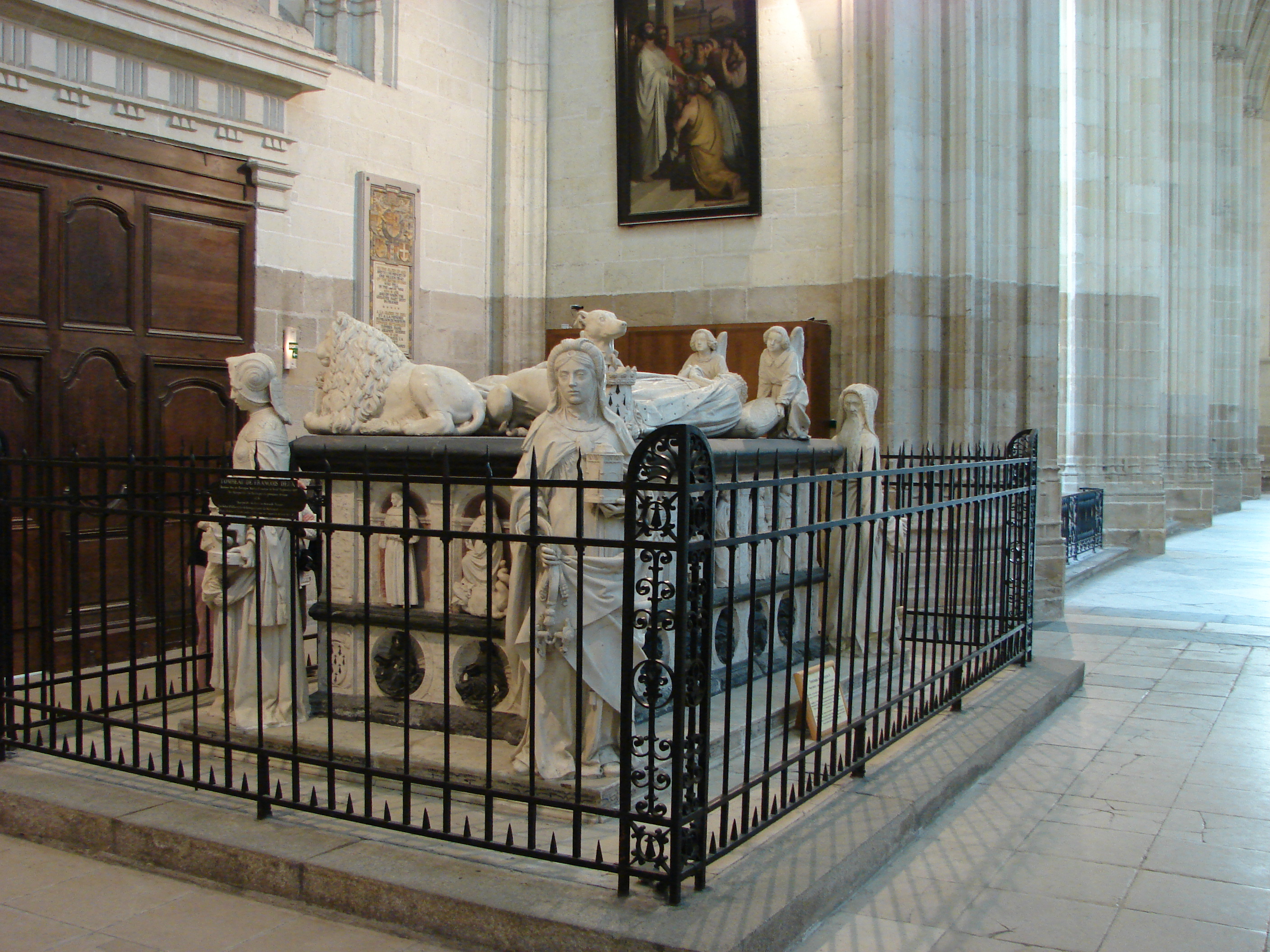 Le tombeau des parents d'Anne de Bretagne, François II et Marguerite de Foix, Nantes